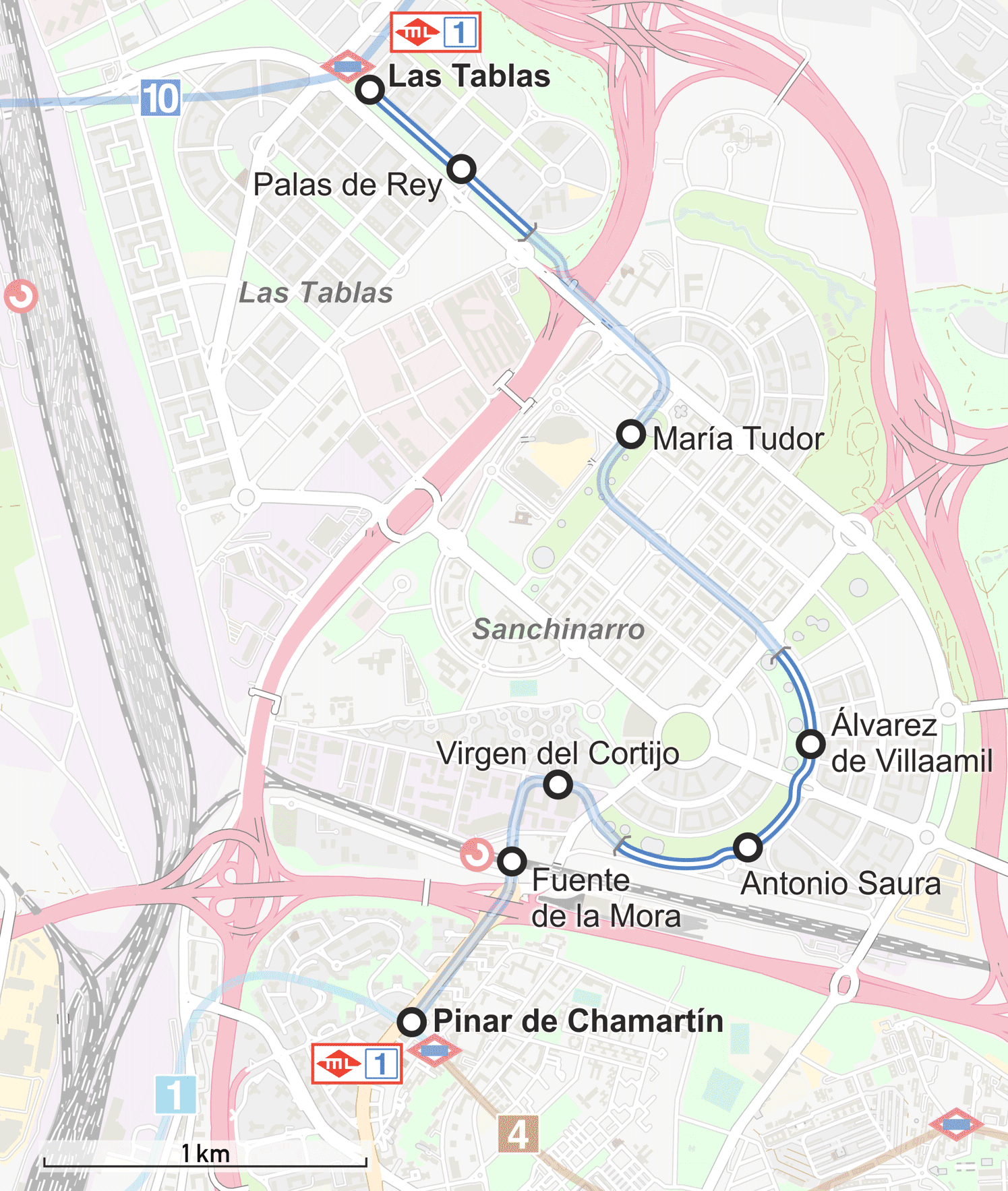 Geografischer Übersichtsplan der Linie ML1 der metro ligero di Madrid